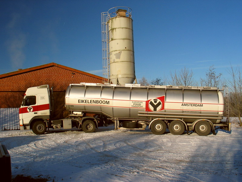 Tankauto